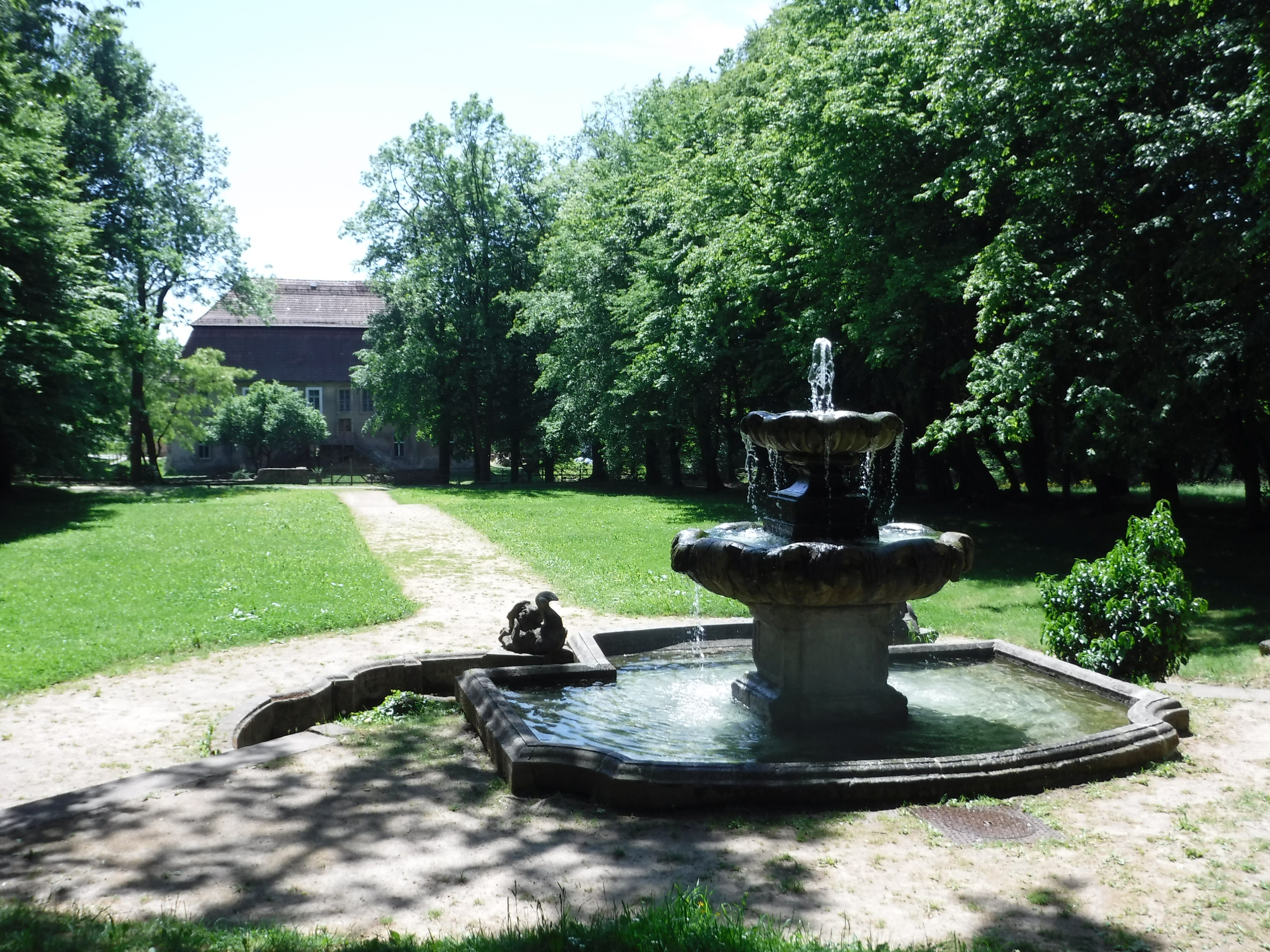 Springbrunnen im Gönnsdorfer Park